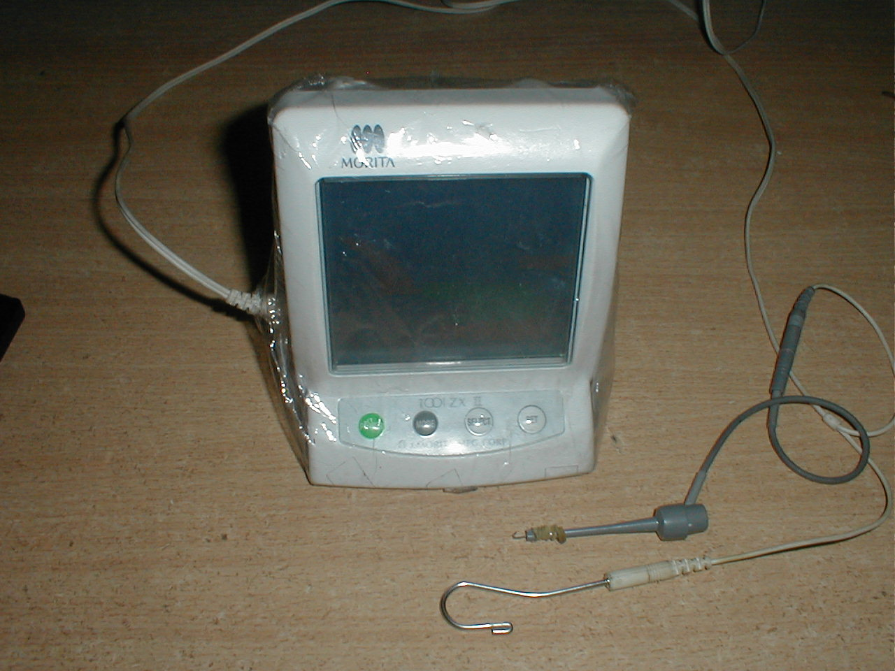 Apex Locator, A Dental Equipment